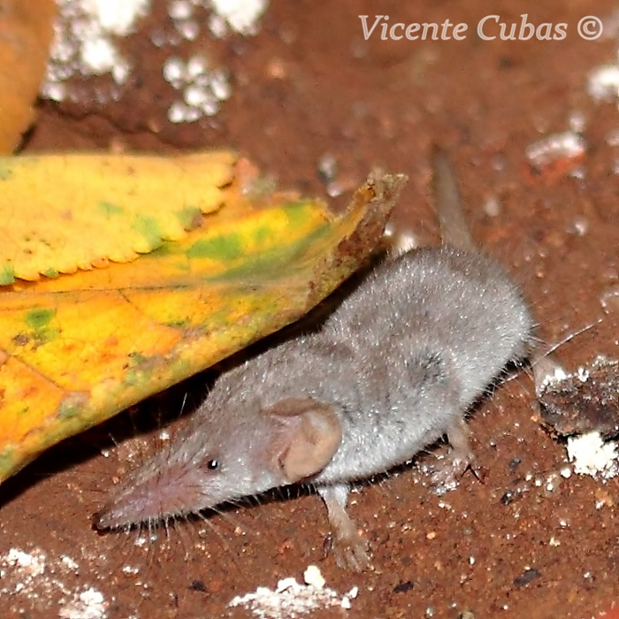 Musaraña de la isla de Tenerife